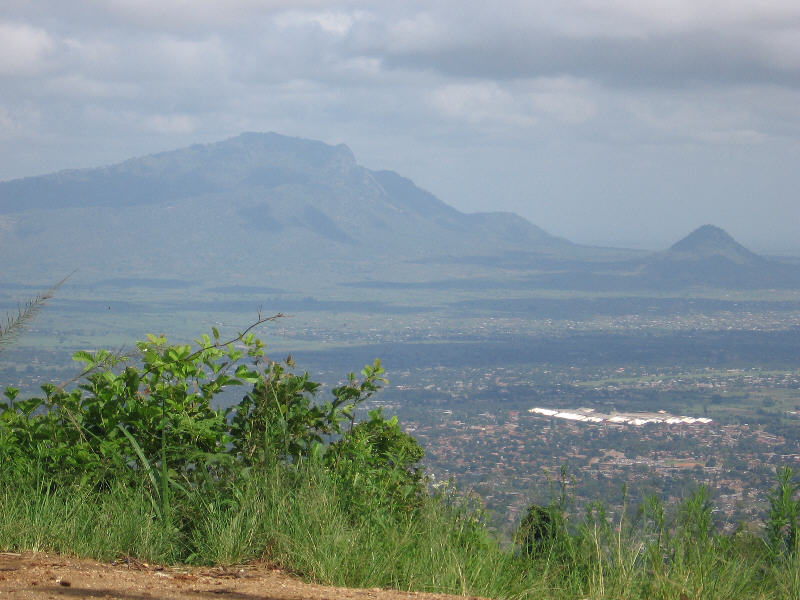 Град Морогоро и планината Улугуру, ТанзанияUnknown morogoro city and uluguru mountains, tanzania